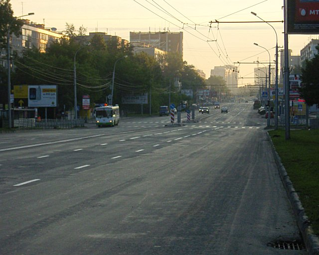 Новосибирск, улица Бориса Богаткова в районе перекрёстка с улицей Федосеева